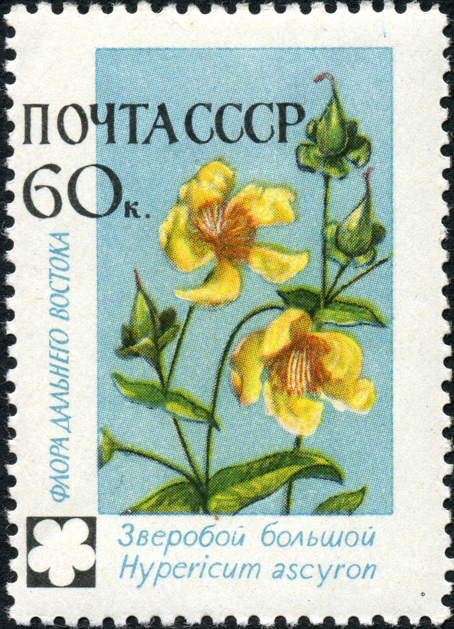 Марка СССР